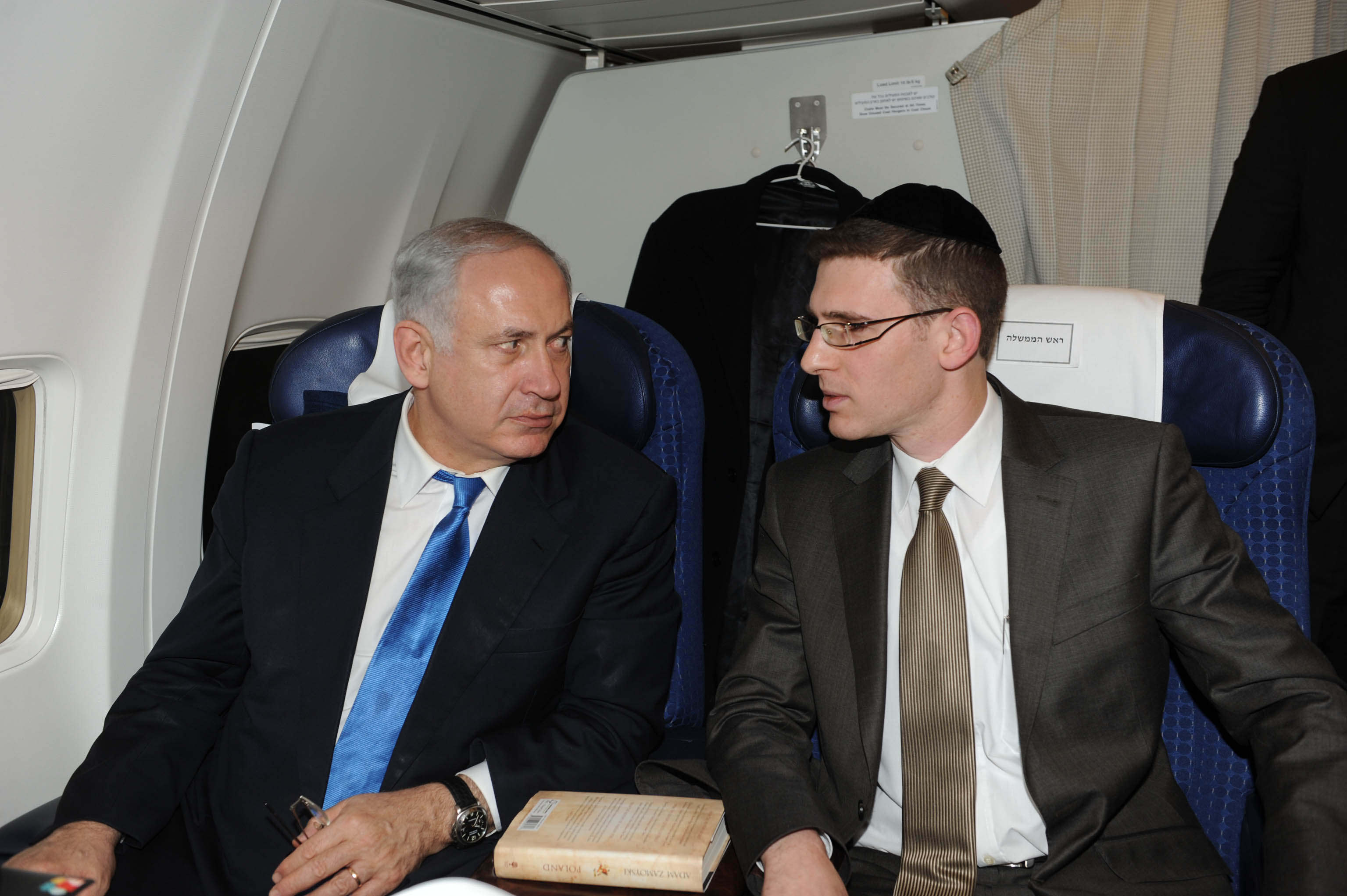 אבי בלום עם נתניהו במטוס ראש הממשלה